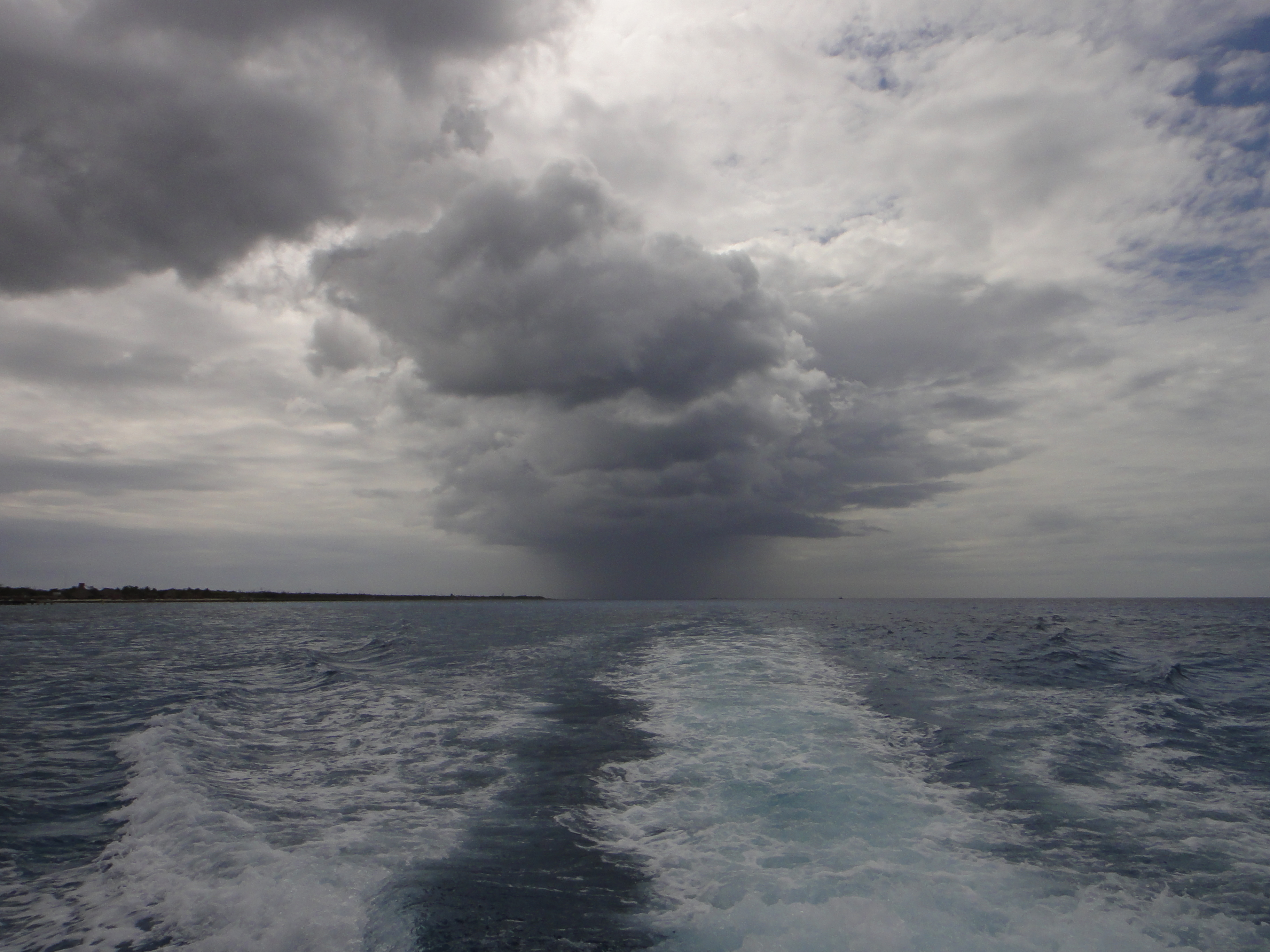 Nubes de tormenta acercándose a nosotros durante una sesión de buceo.